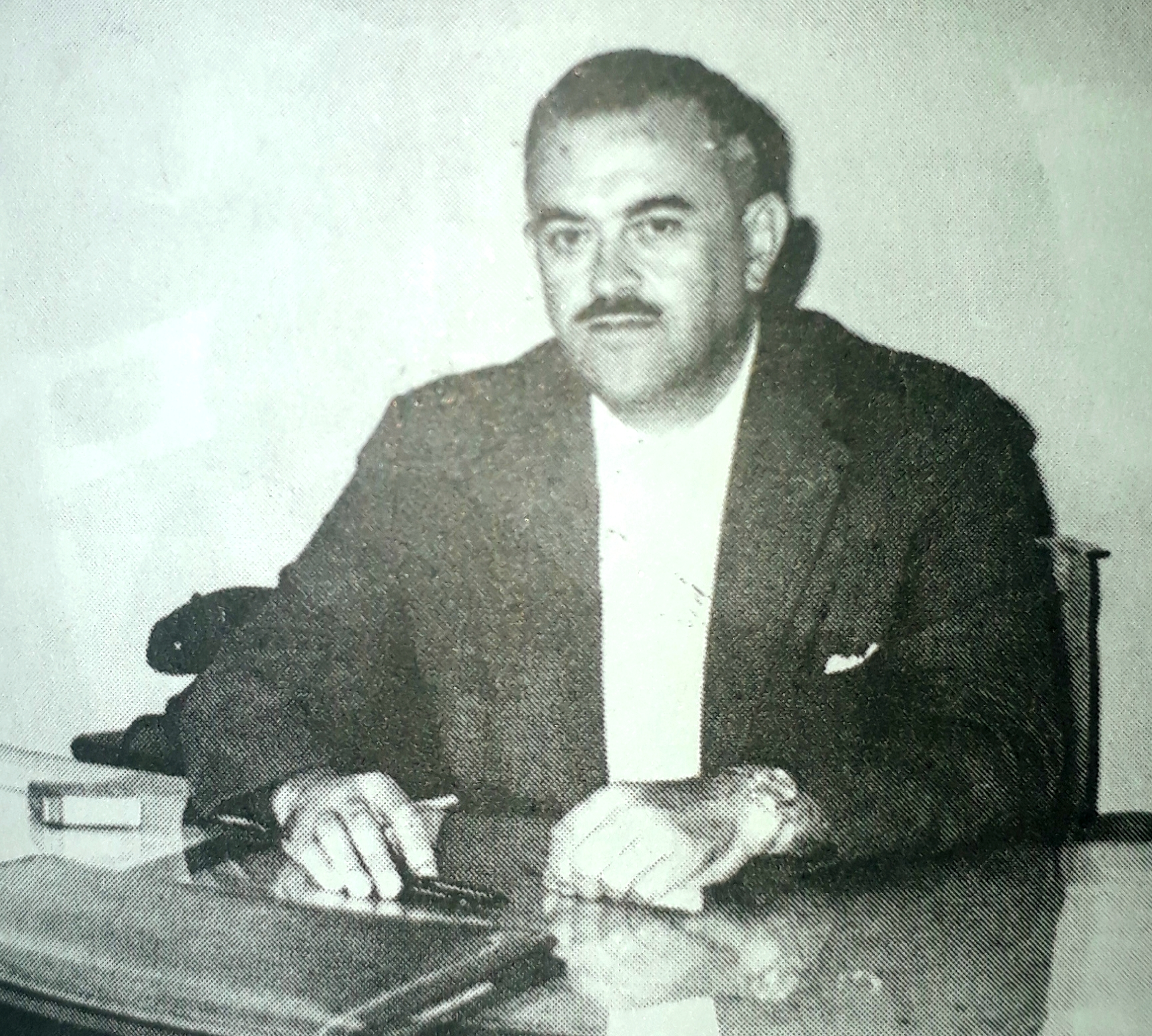 Péricles Pacheco da Silva, político brasileiro, s/d.